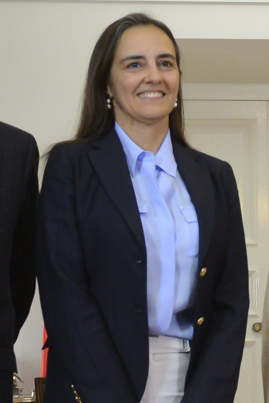 Carmen Gloria López cuando era directora ejecutiva del canal estatal Televisión Nacional de Chile. La foto de la cual está sacada la muestra al lado de la presidenta Michelle Bachelet con los miembros de la Asociación Nacional de Televisión (Anatel).